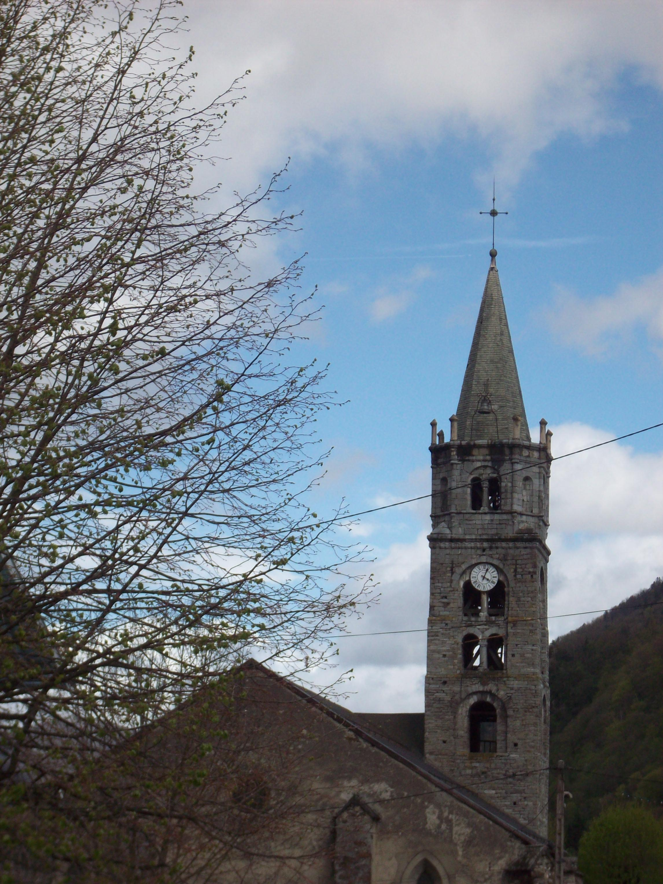 Eglise Notre-Dame de Vicdessos